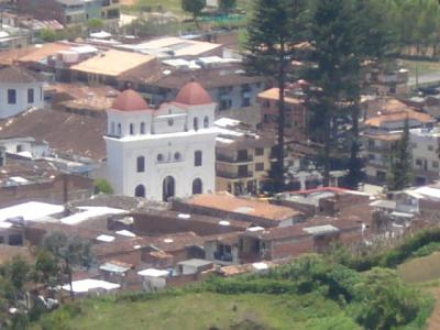 EL__santuario